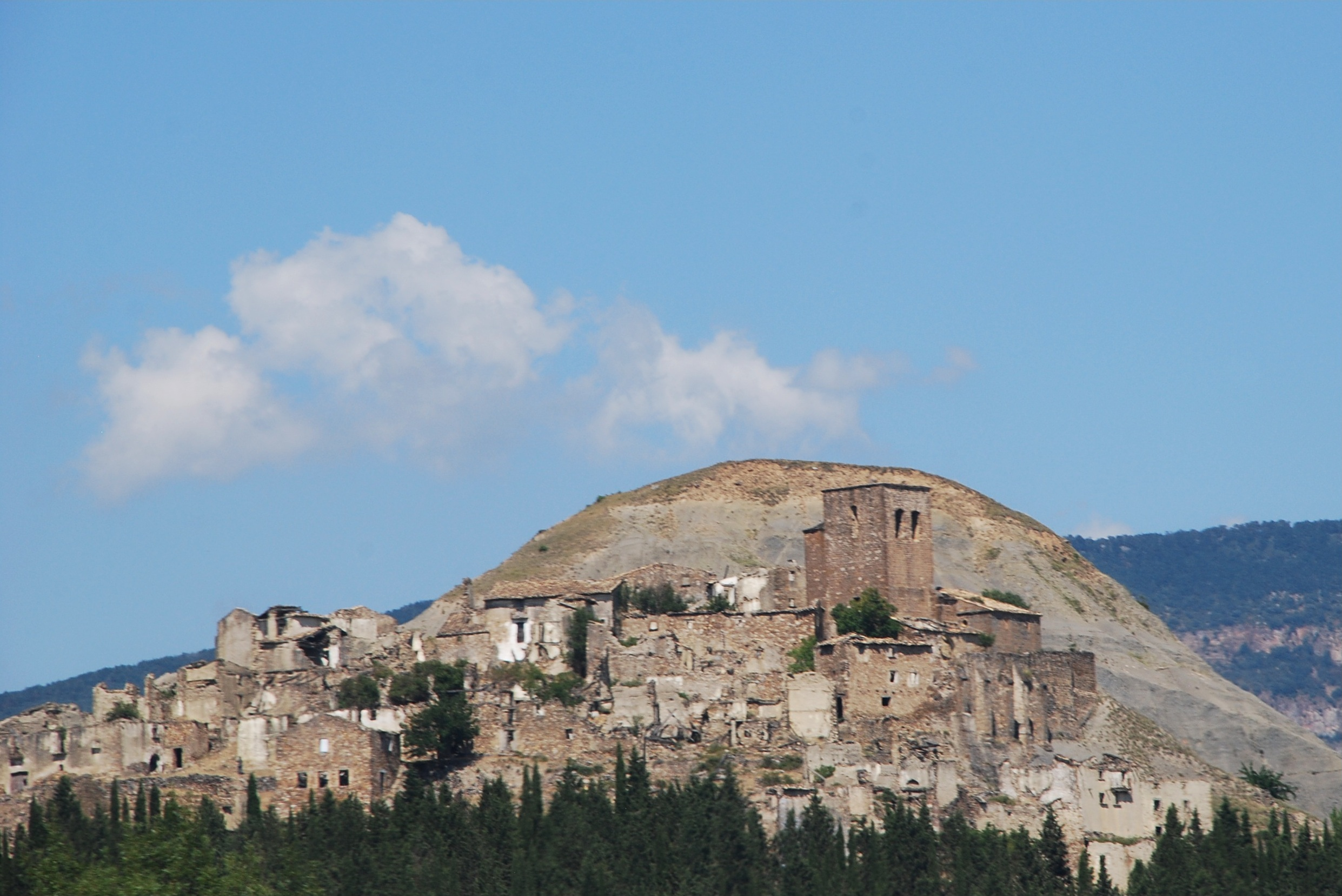 Escó, localidad del municipio de Sigüés, provincia de Zaragoza (España).